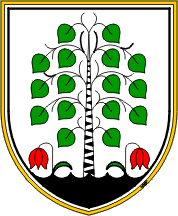 Wappen von Brezovica Slowenien